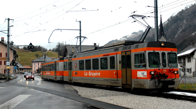 BDe 4/4 123 und Bt 226 der Freiburgischen Verkehrsbetriebe (TPF) in Montbovon